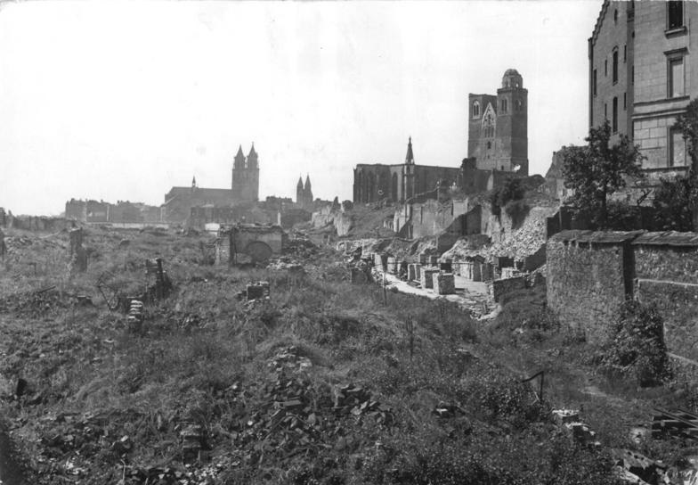 Magdeburg, Blick auf die zerstörte Altstadt Zentralbild Rösener 29.5.1952 Freiwilliger Aufbau in Magdeburg Angeregt durch das Nationale Aufbauprogramm Berlins wird die Enttrümmerung und der Aufbau auch der anderen durch Amibomben zerstörten Städte der DDR vorangetrieben. In mAgdeburg zum Beispiel wurde die Enttrümmerung neu nach Stadtteilen organisiert und die Abfuhr durch Stellung der notwendigen Transportmittel verbessert. UBz: Blick auf die zerstörte Altstadt mit den Häuser- und Kirchenruinen.